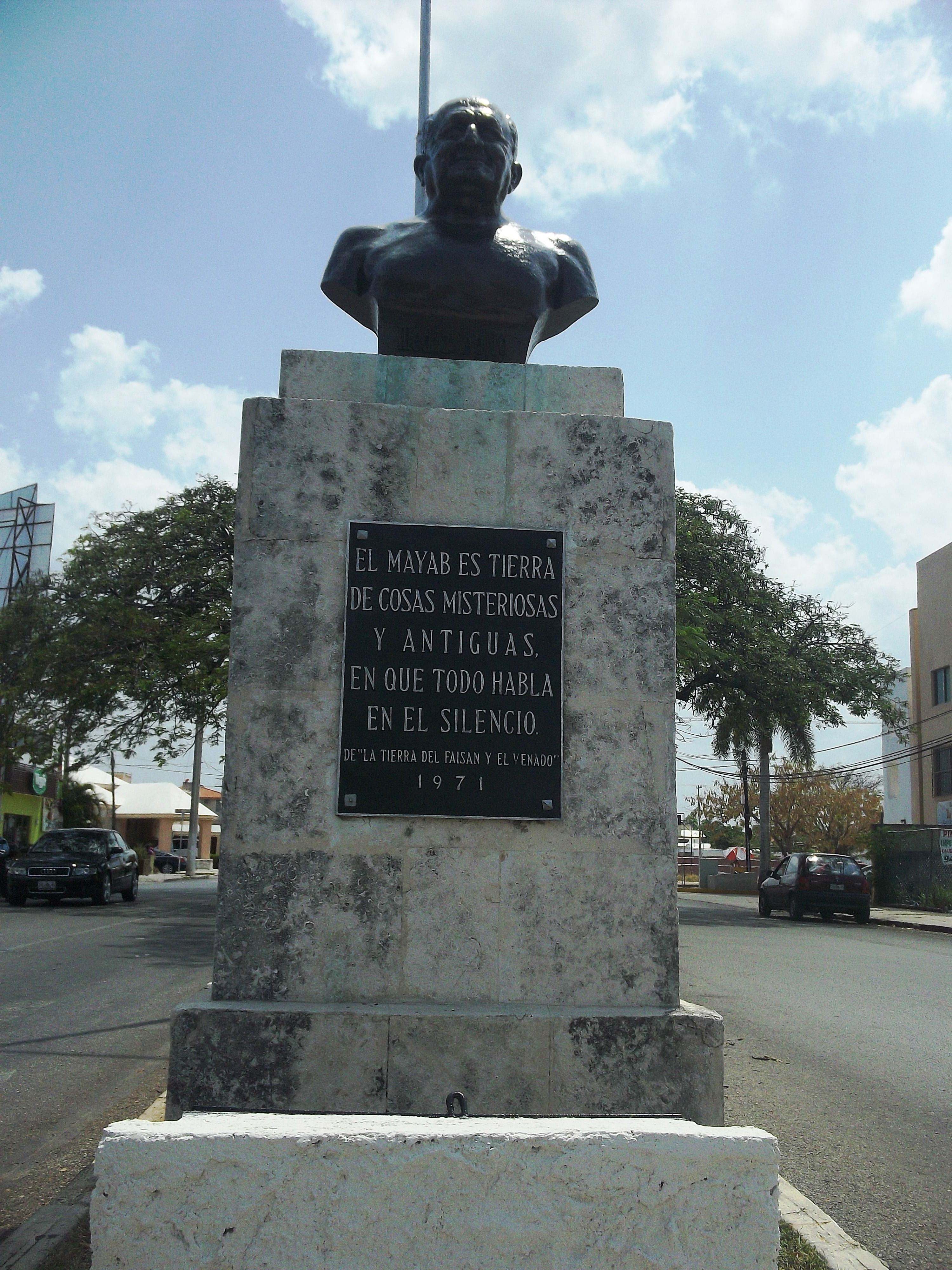 Busto de Antonio Mediz Bolio en la Avenida Campestre, Mérida, Yucatán.